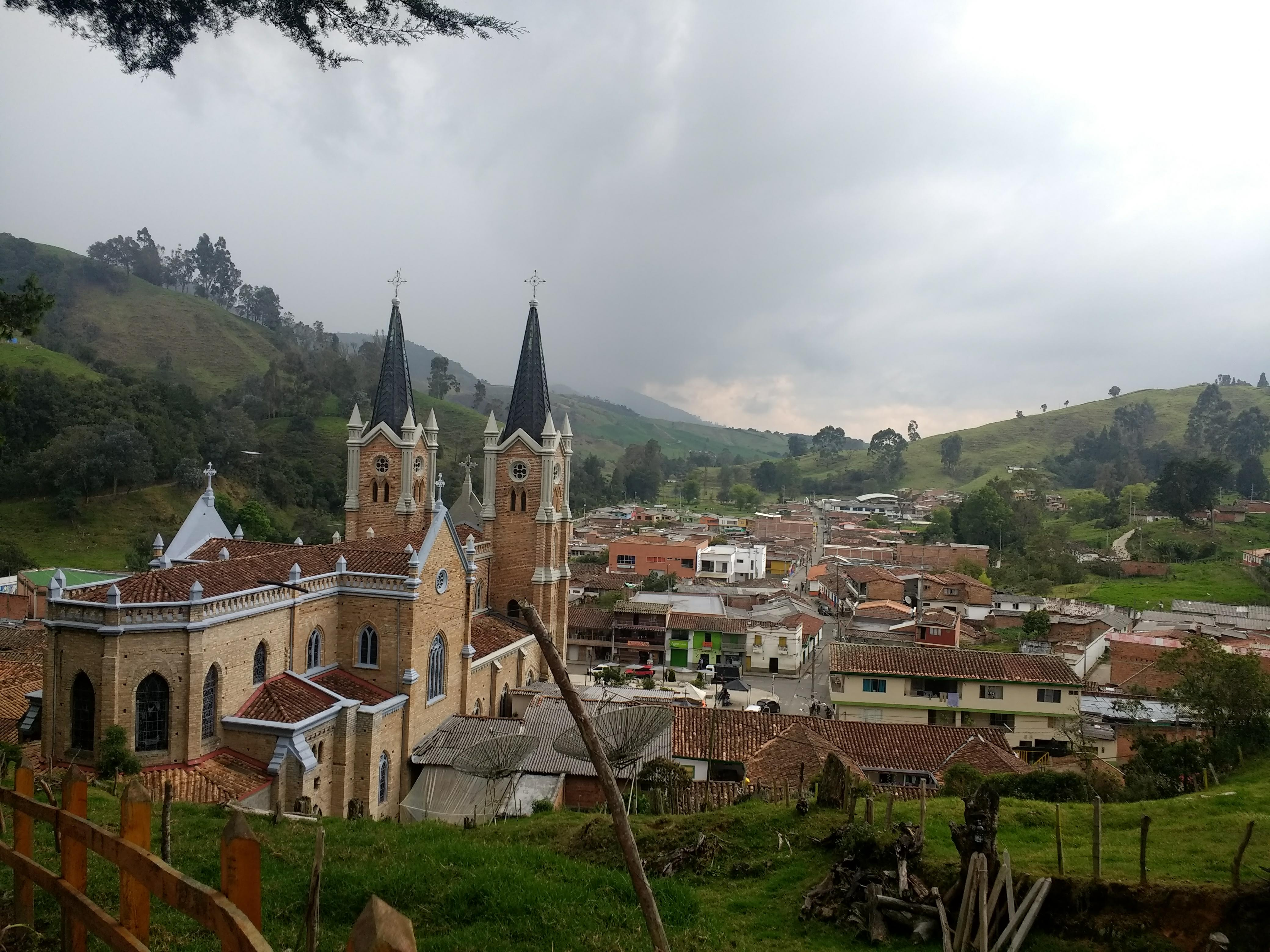 Iglesia de Nuestra Señora del Rosario, Belmira